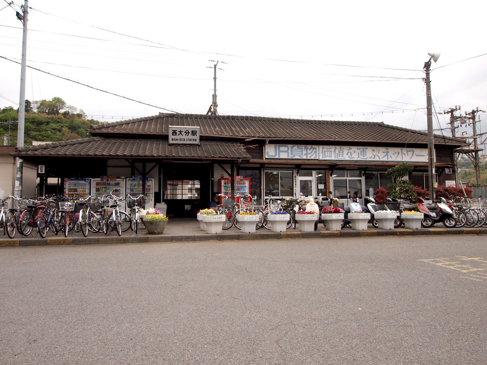 JR九州西大分駅（大分県大分市）